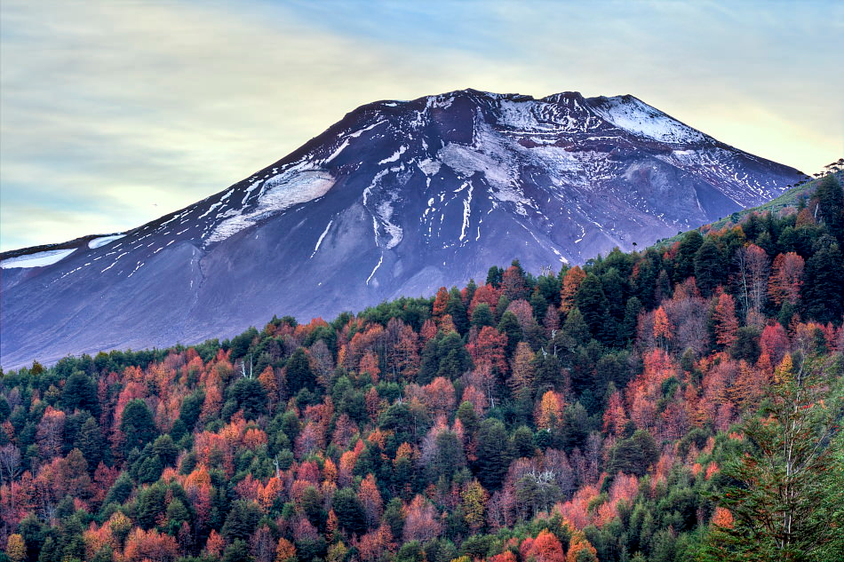 volcan_cautin